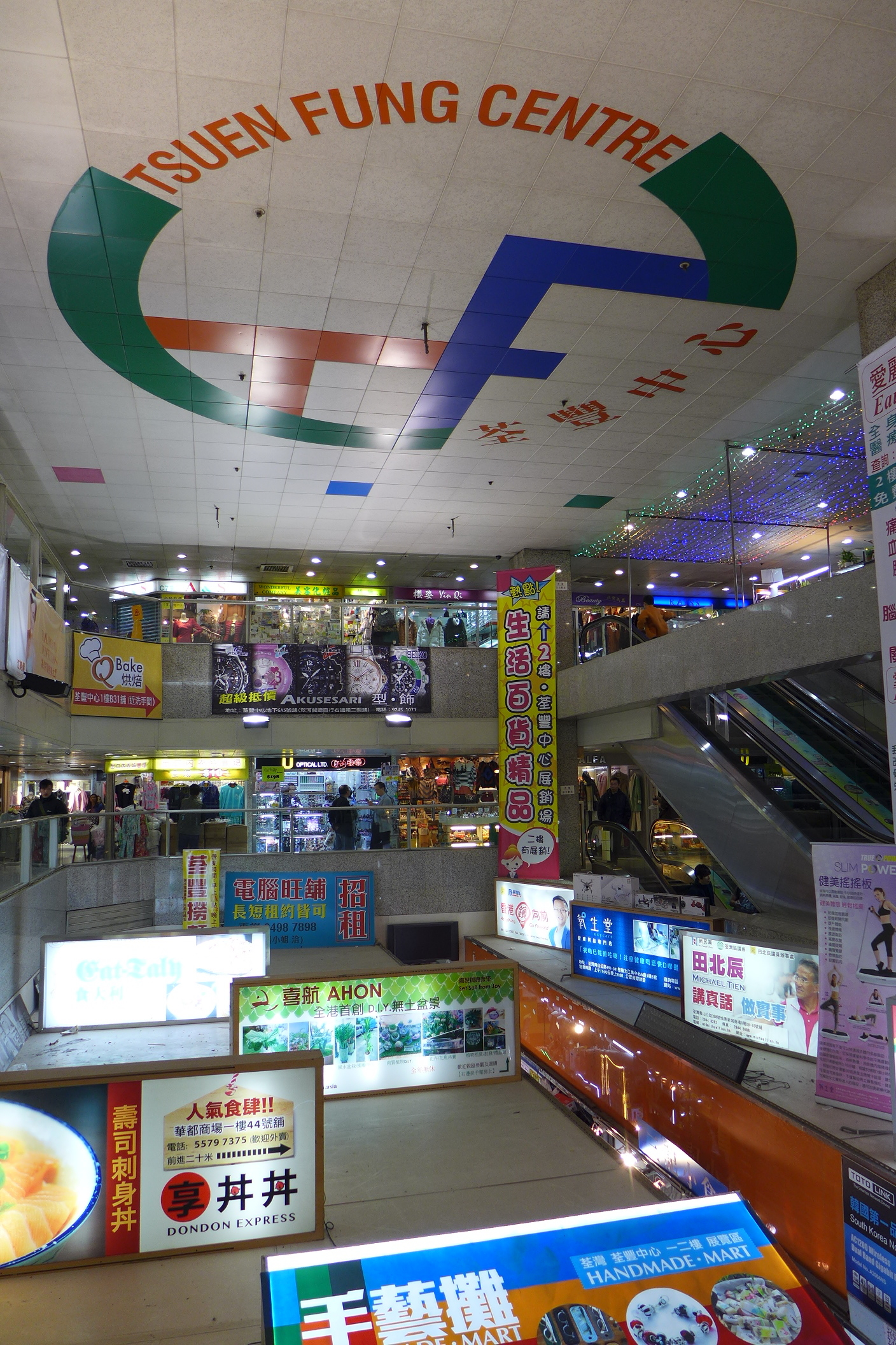 Tsuen Fung Centre Void